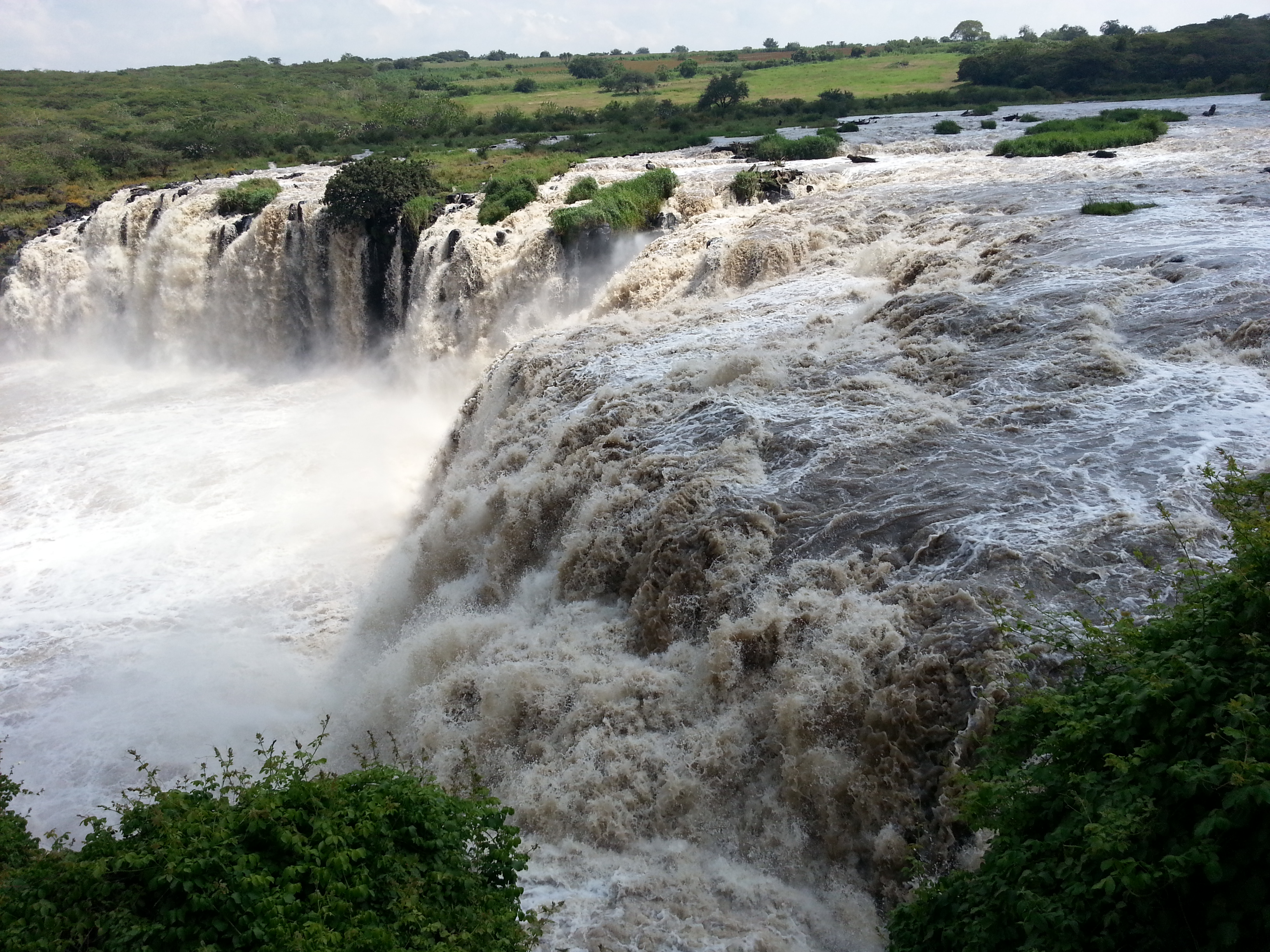 Cascada la piedad michoacan